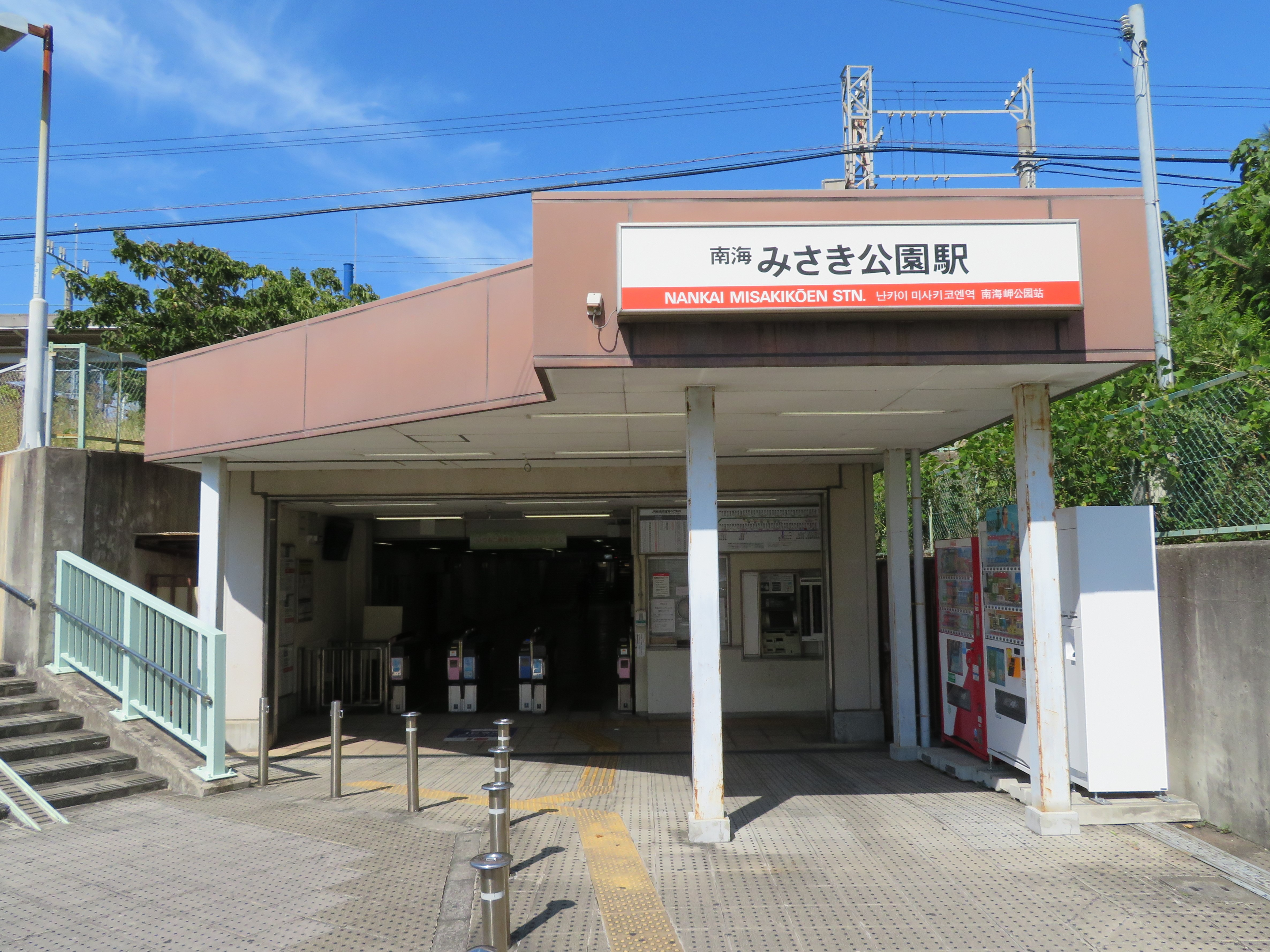 南海電鉄みさき公園駅東口